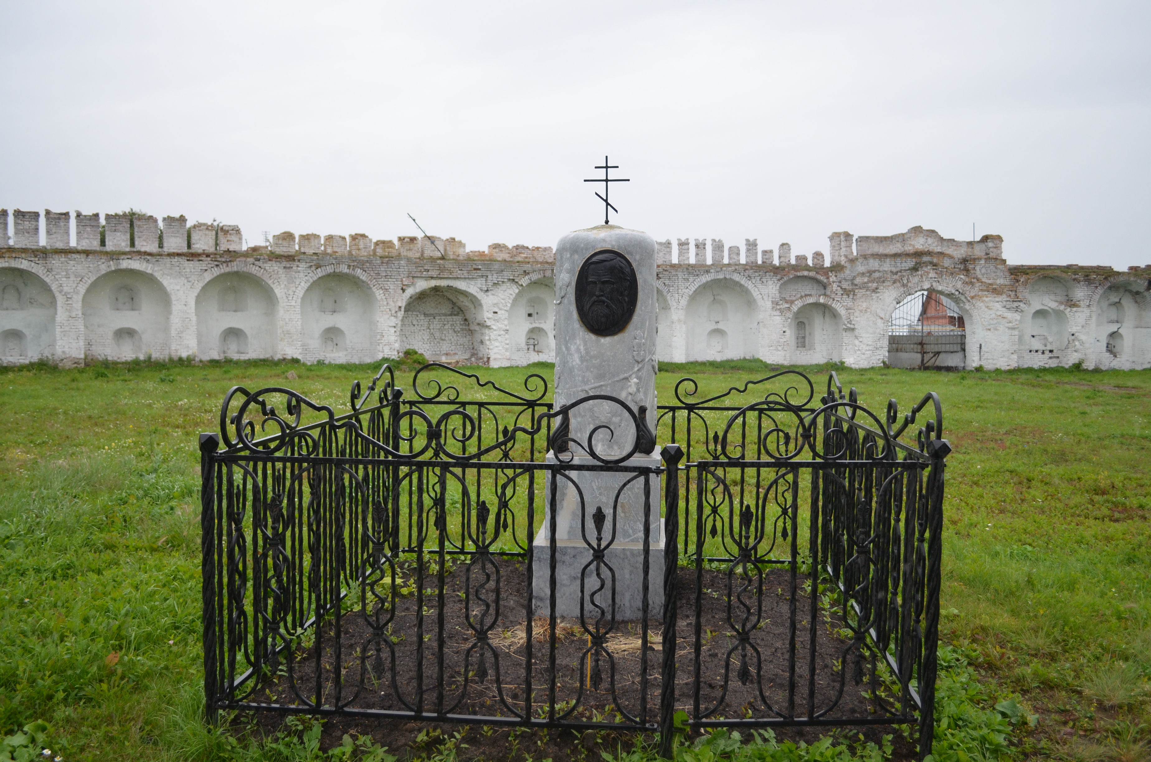 Могила А.Н. Зырянова, историка и краеведа (Курганская область, Далматово, улица Советская, Далматовский монастырь)